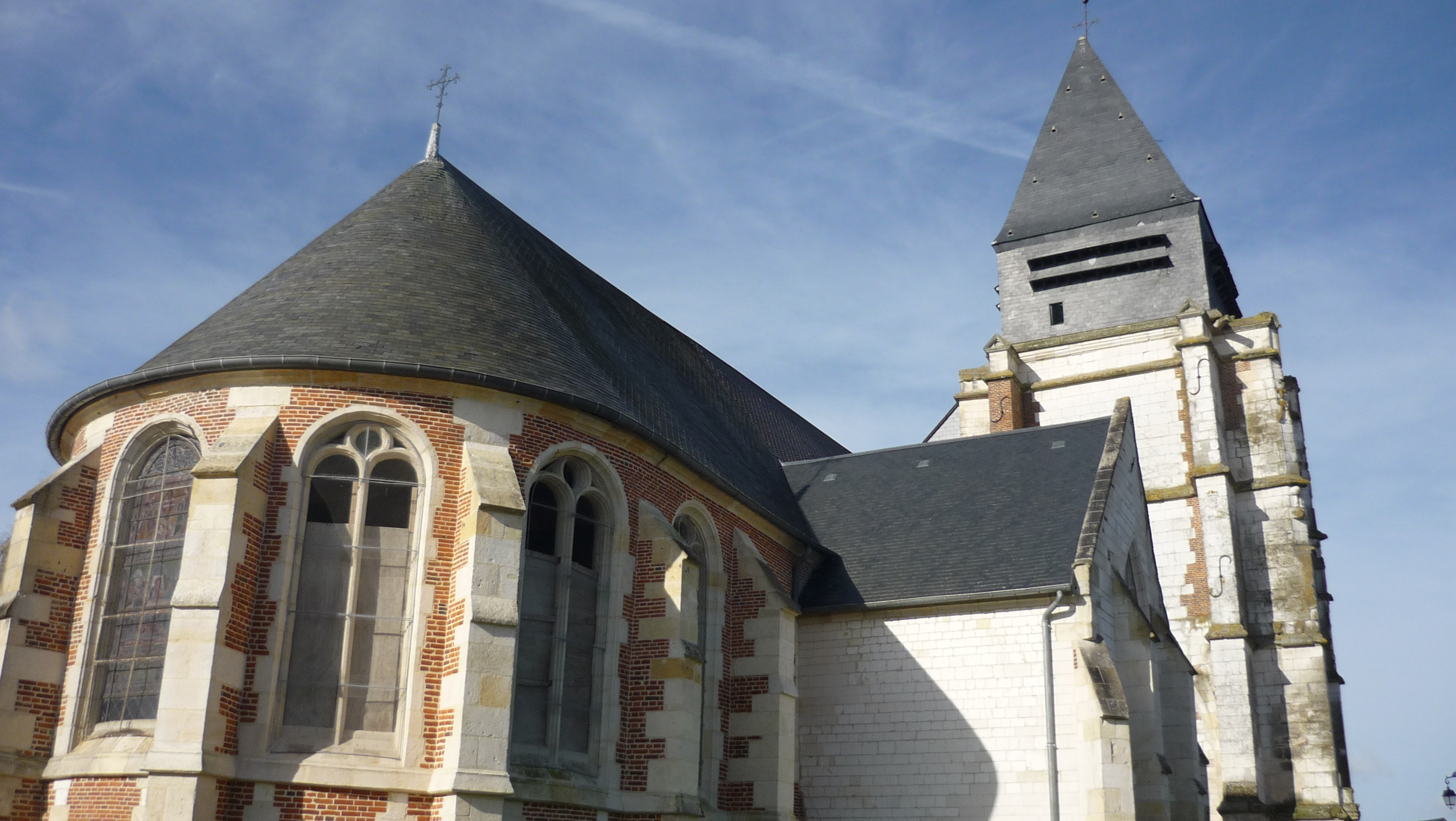 Eglise de Catillon, située dans la commune de Catillon-Fumechon (Oise, 60), inscrite sur la liste des Monuments Historiques de France depuis le 23 février 1951 (PA00114566)